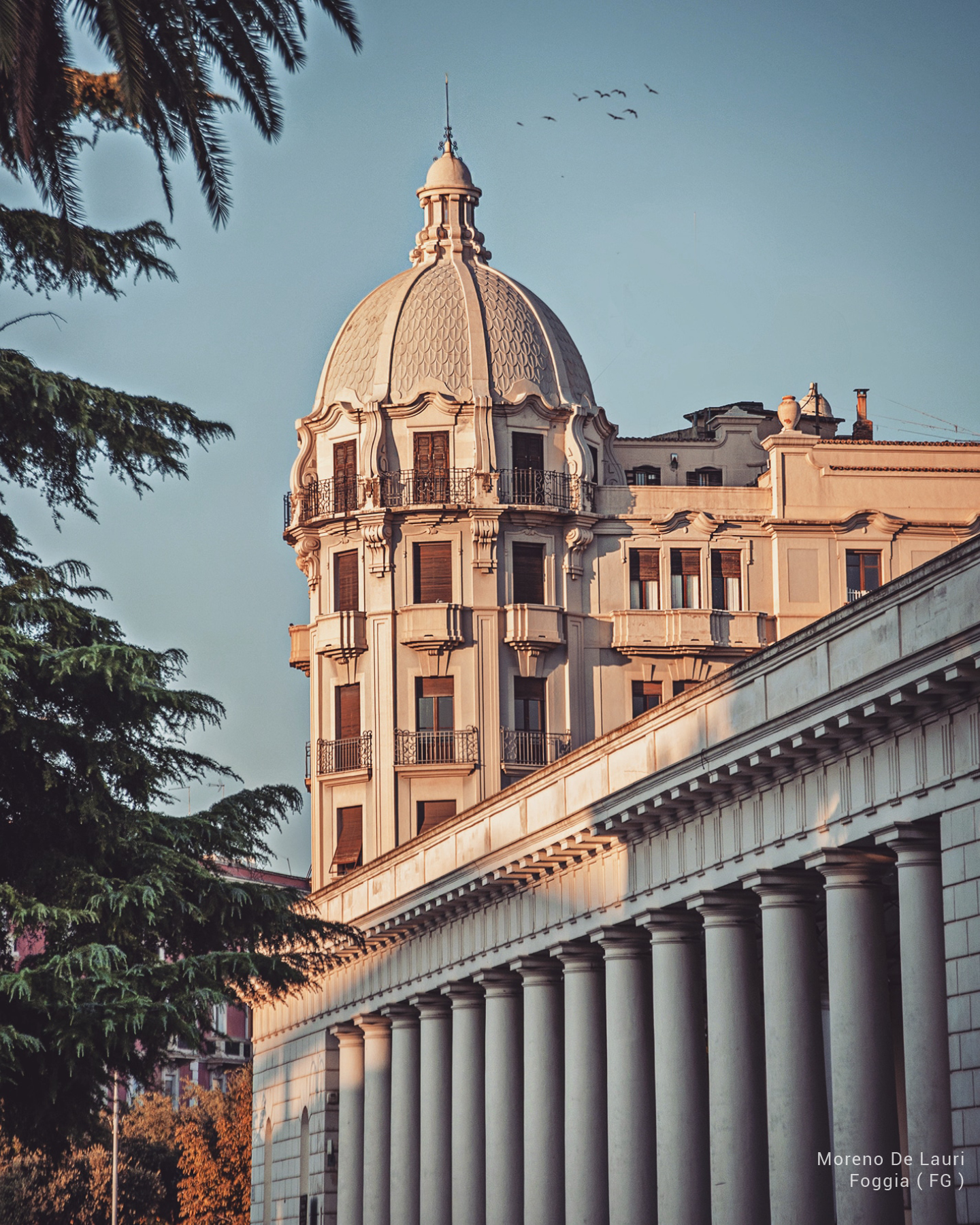 Stile liberty